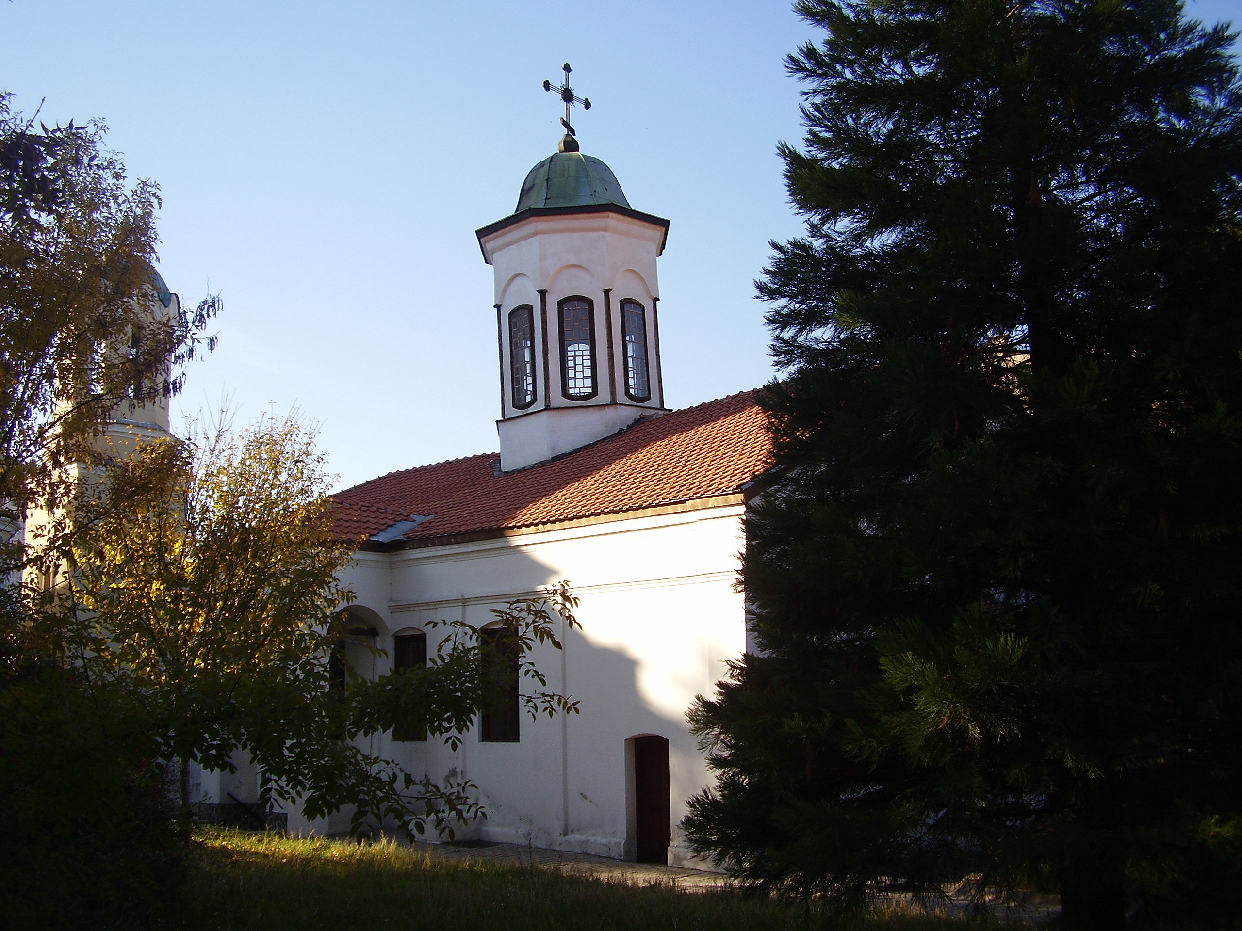 Възрожденската църква "Свети Мина" Кюстендил